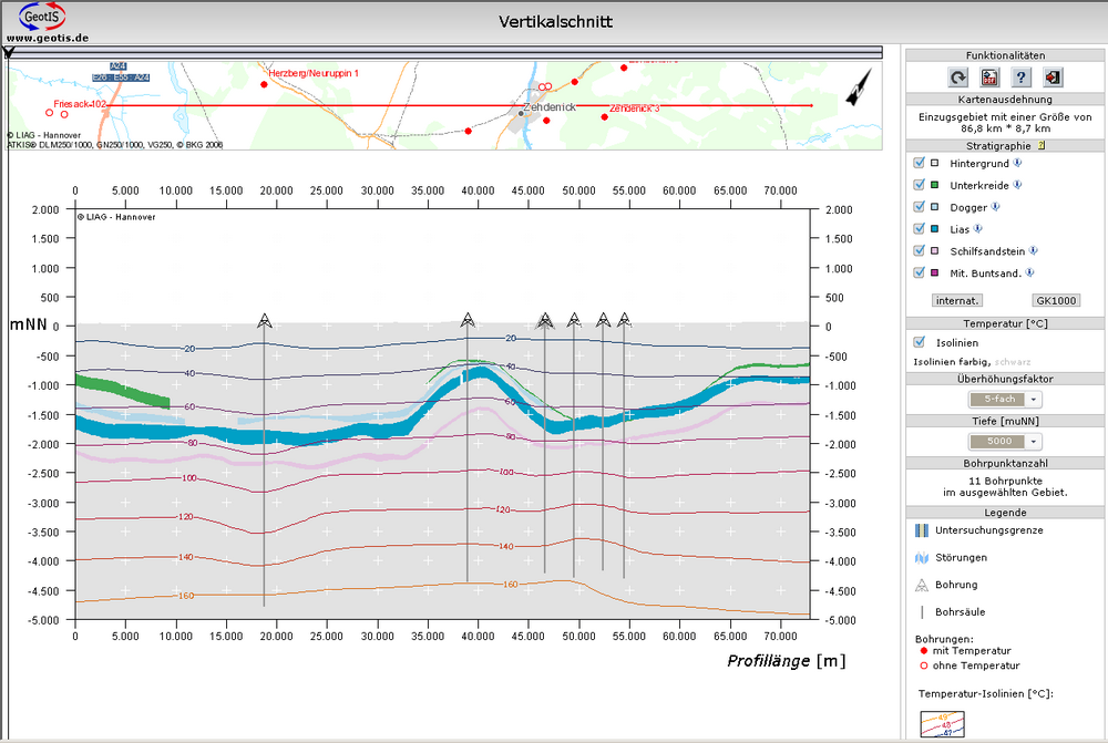 Screenshot vom GeotIS